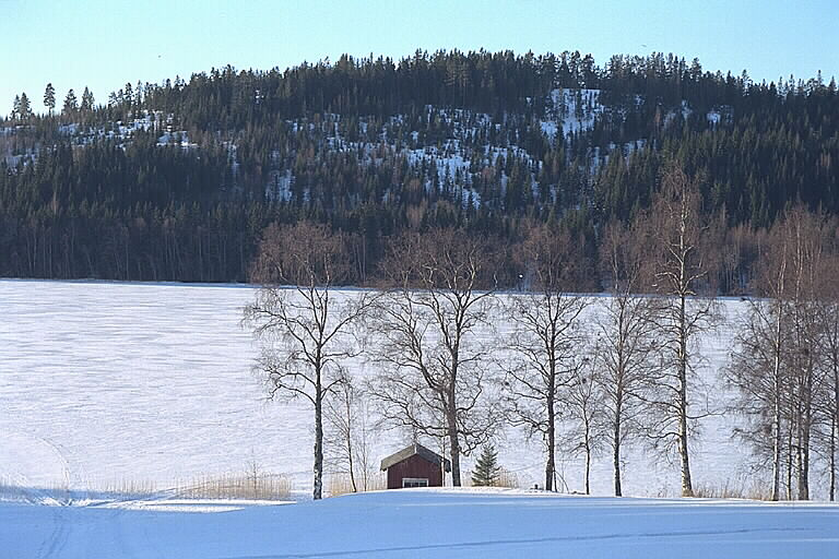 Vid Gallsätter, ingår i Höga kusten världsarvsområde. Motiv: Storsjön Nyckelord: Riksintressen, Vintermotiv, Världsarv Kategori: Insjömiljöer Vid Gallsätter, ingår i Höga kusten världsarvsområde.